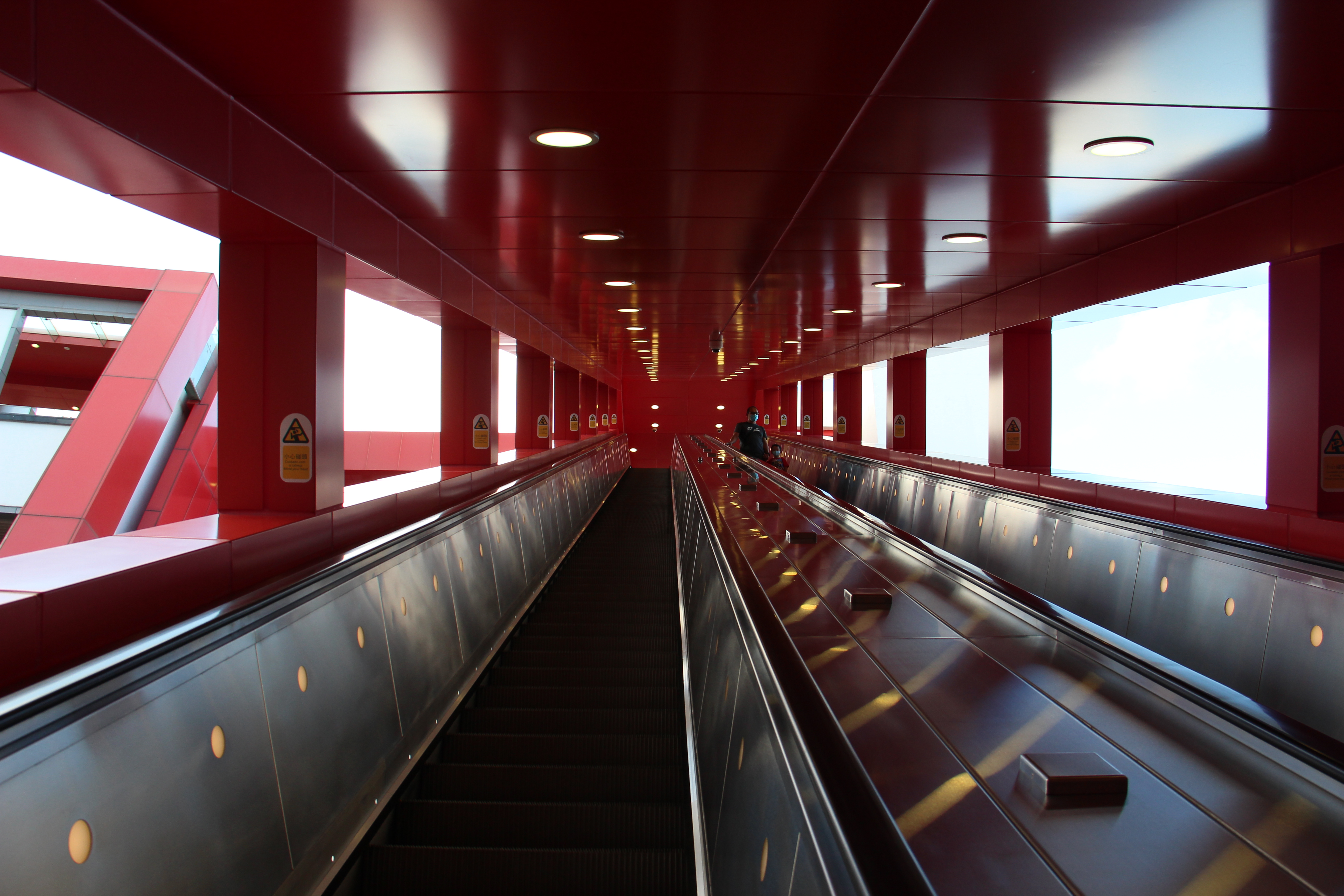 中文（香港）: 澳門輕軌機場站扶手電梯（B出口）